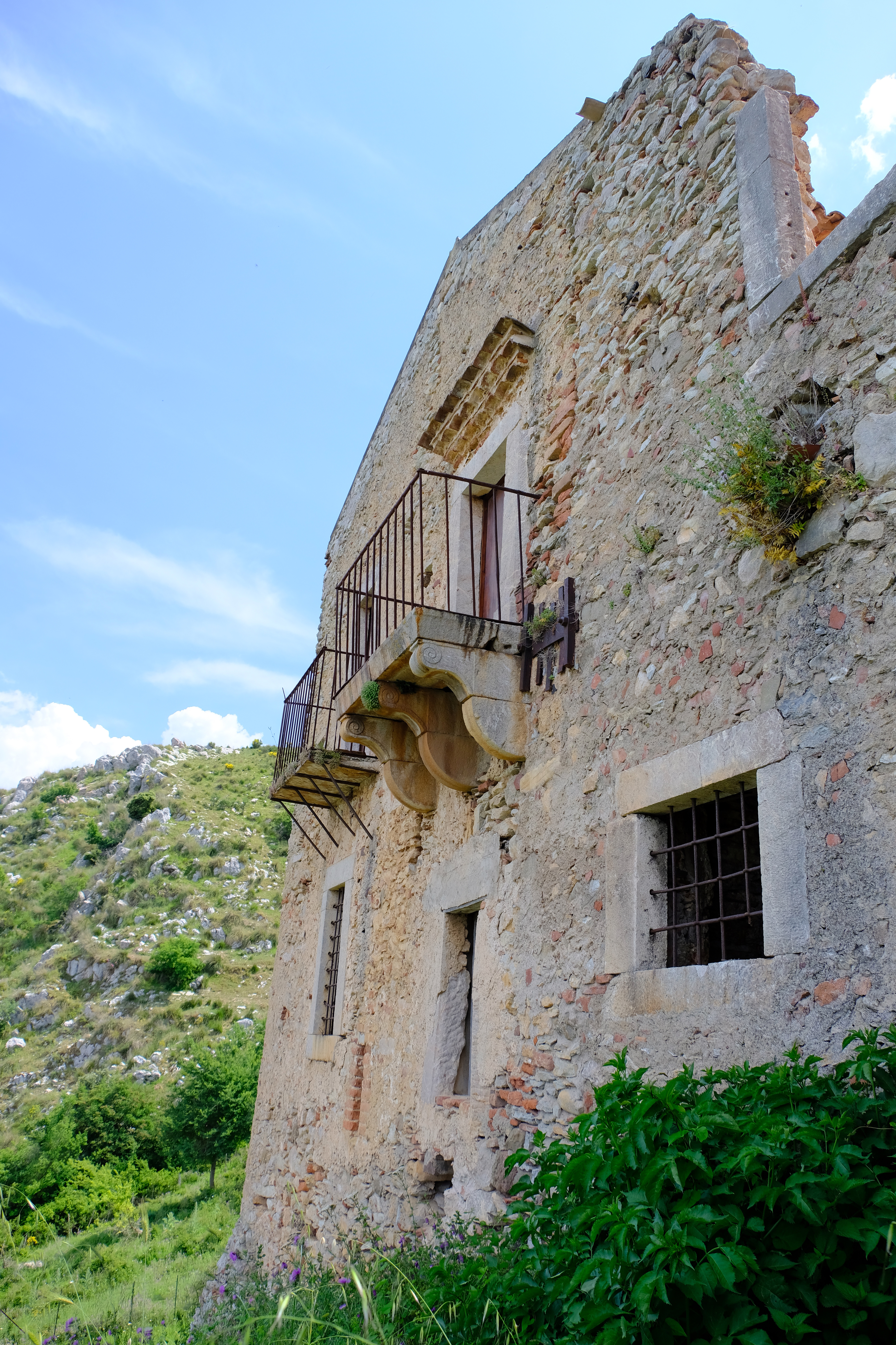 Convento di San Filippo di Fragalà